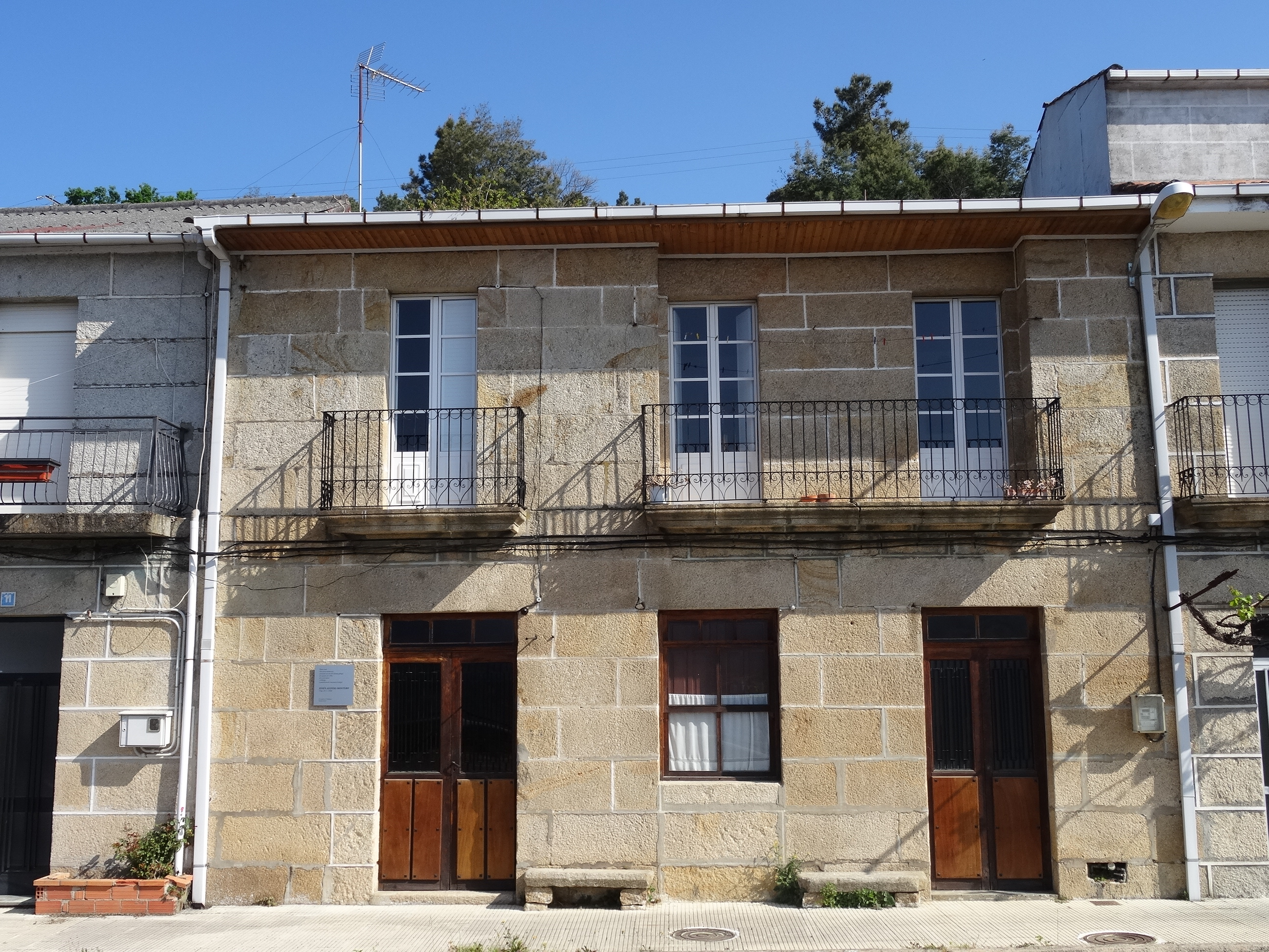 Casa dos avós maternos de Xesús Alonso Montero en Ventosela do Gaiteiro, Ribadavia